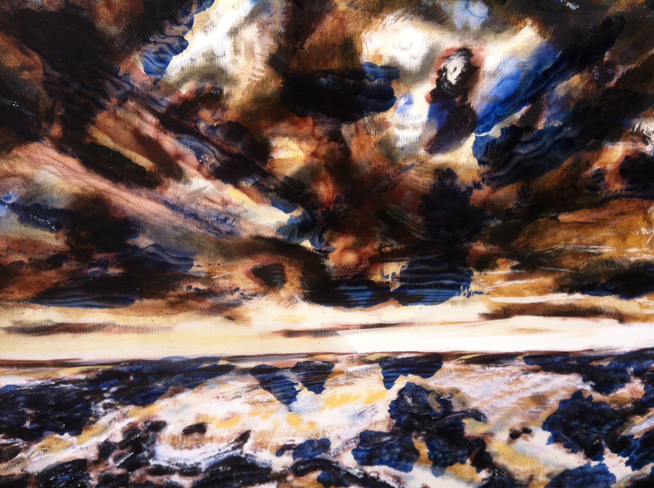 Isländische Welle 2019, eine Vision, 102x 142.5cm venezianische Email Oel Malerei @Curt Walter, Monte TI Aus der Reihe lyrische Landschaften